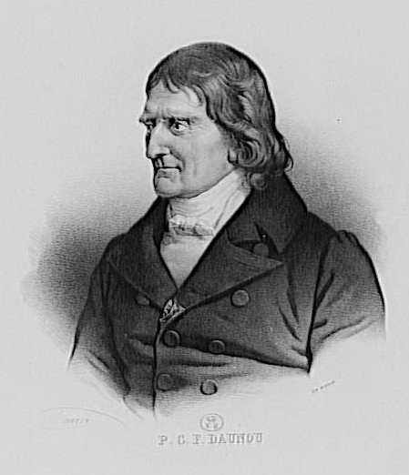 Pierre Claude François Daunou (1761-1840), French historian and politician